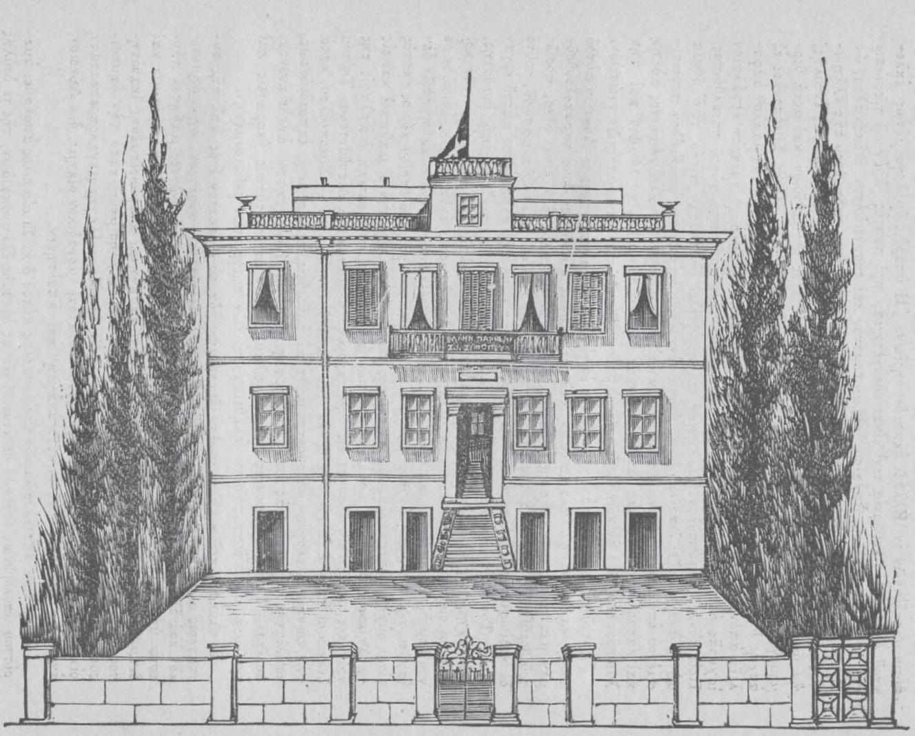 Historische Skizze einer Mädchenschule in Athen, die von der Frau Sofia Simonopoulou gestiftet wurde, 19. Jahrhundert